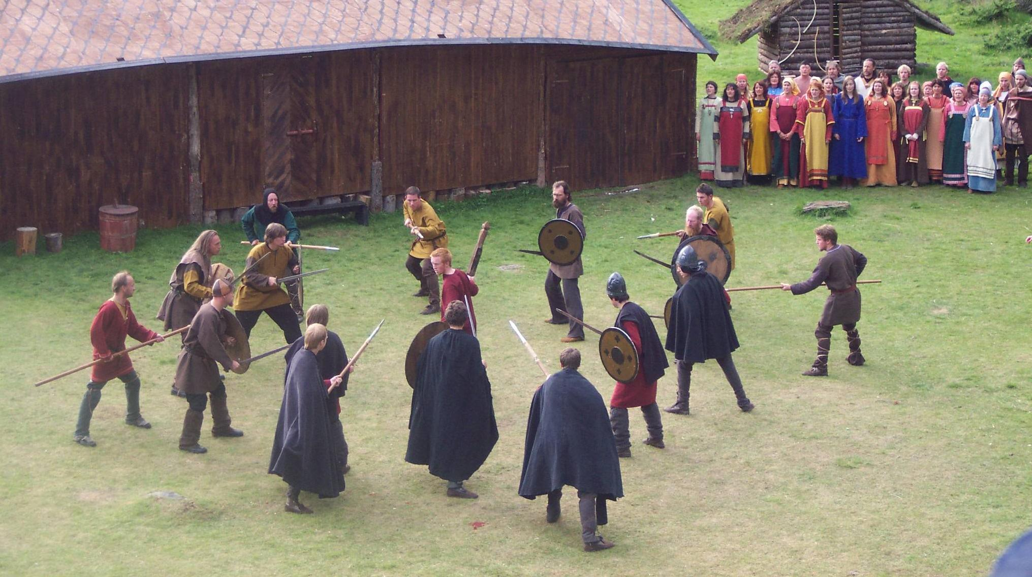 Bilde fra Steigen Sagaspill 2005. Hagbart er blitt oppdaget i Signes jomfrubur, og er nå blitt omringet av Kong Sigards vakter. Bilde tatt av Mari Pedersen, med Bruker:ThorRune's kamera.